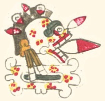 Mictlantecuhtli